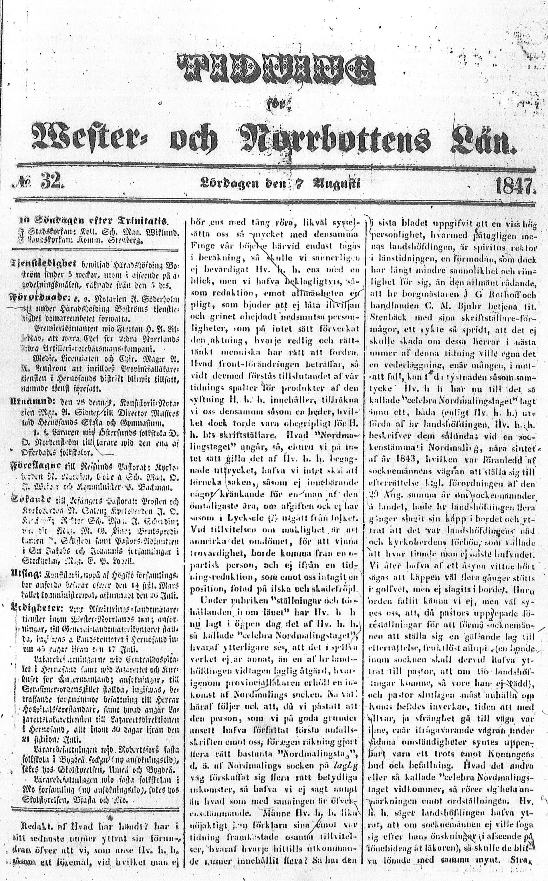 Tidning för Wester- och Norrbottens Län. nummer 32. Sidan 1.